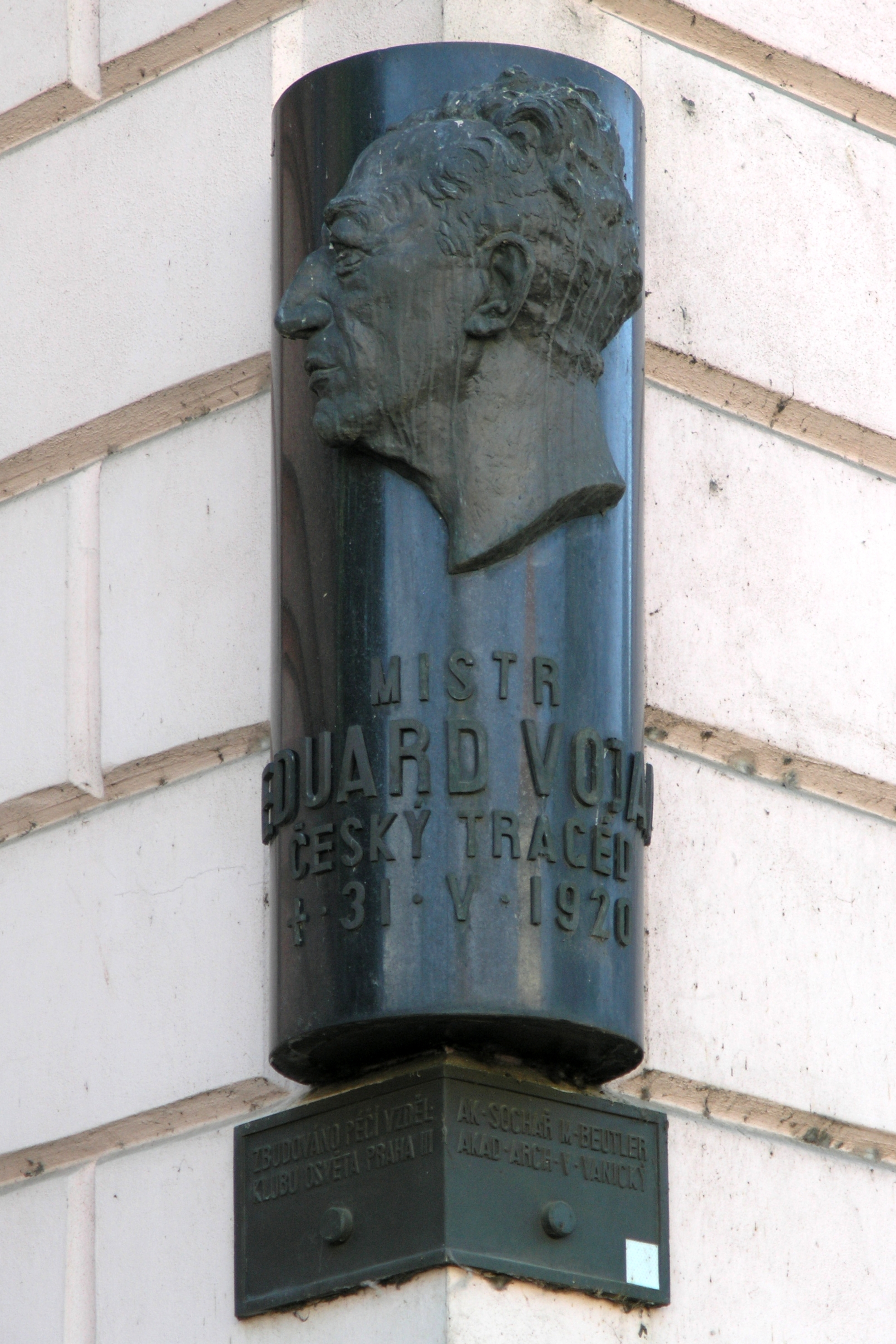 Praha, Malá Strana - Eduard Vojan (Staré zámecké schody), ulice Pod Bruskou 3/147